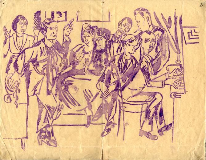 Михаил Ле-Дантю. Сотрудники и читатели журнала "Бескровное убийство" (рисунок): Роза Левинсонд, Николай Лапшин, Михаил Ле-Дантю, Екатерина Турова, Янко Лаврин.